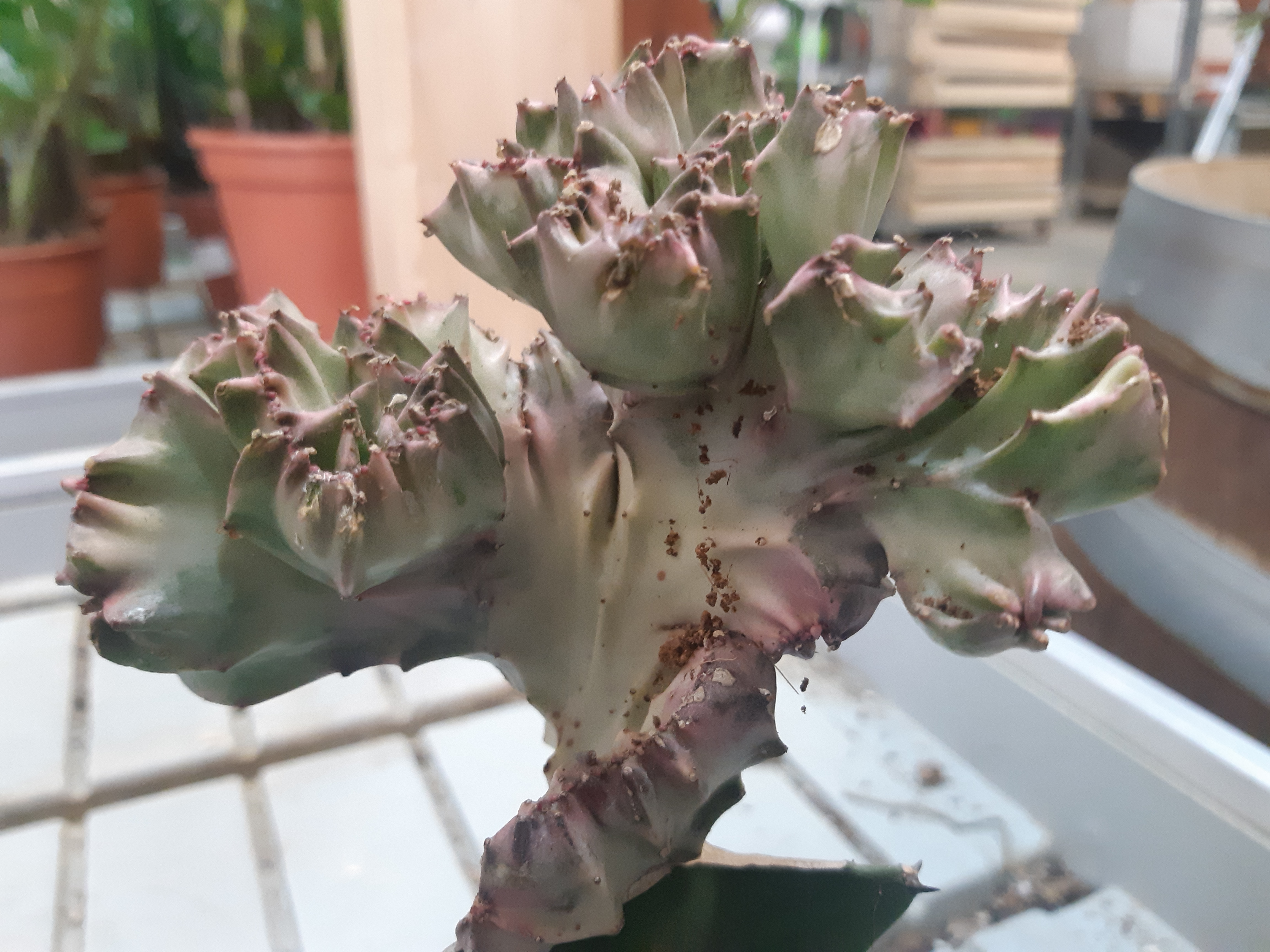 דוגמה ליצירת צורות מוזרות בסוקולנטיםה